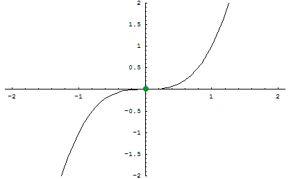 Afbeelding voor wiskundige pagina over extrema. Afbeelding mag vrij gebruikt worden.